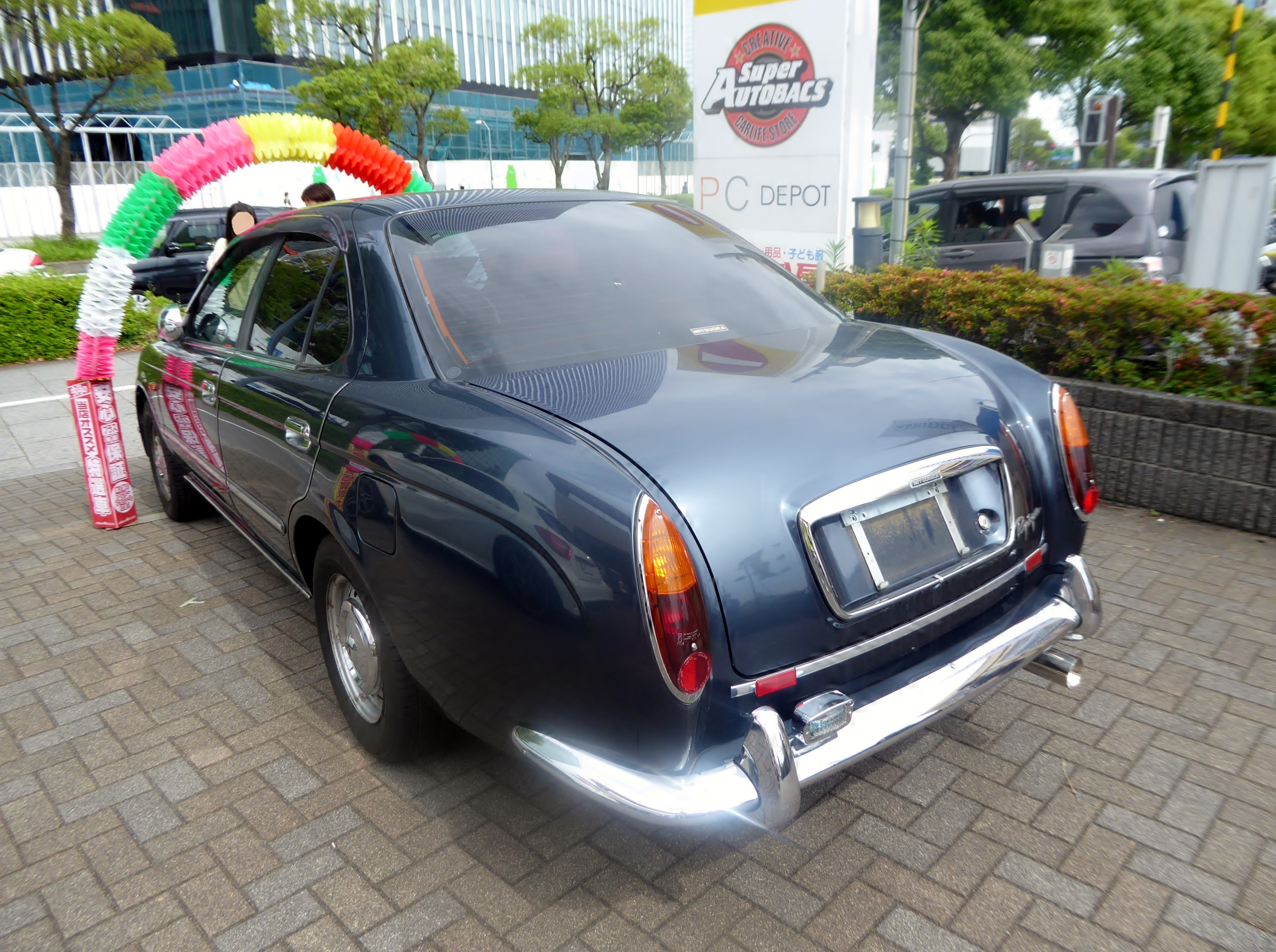 B15型改光岡・リョーガをリアから撮影。